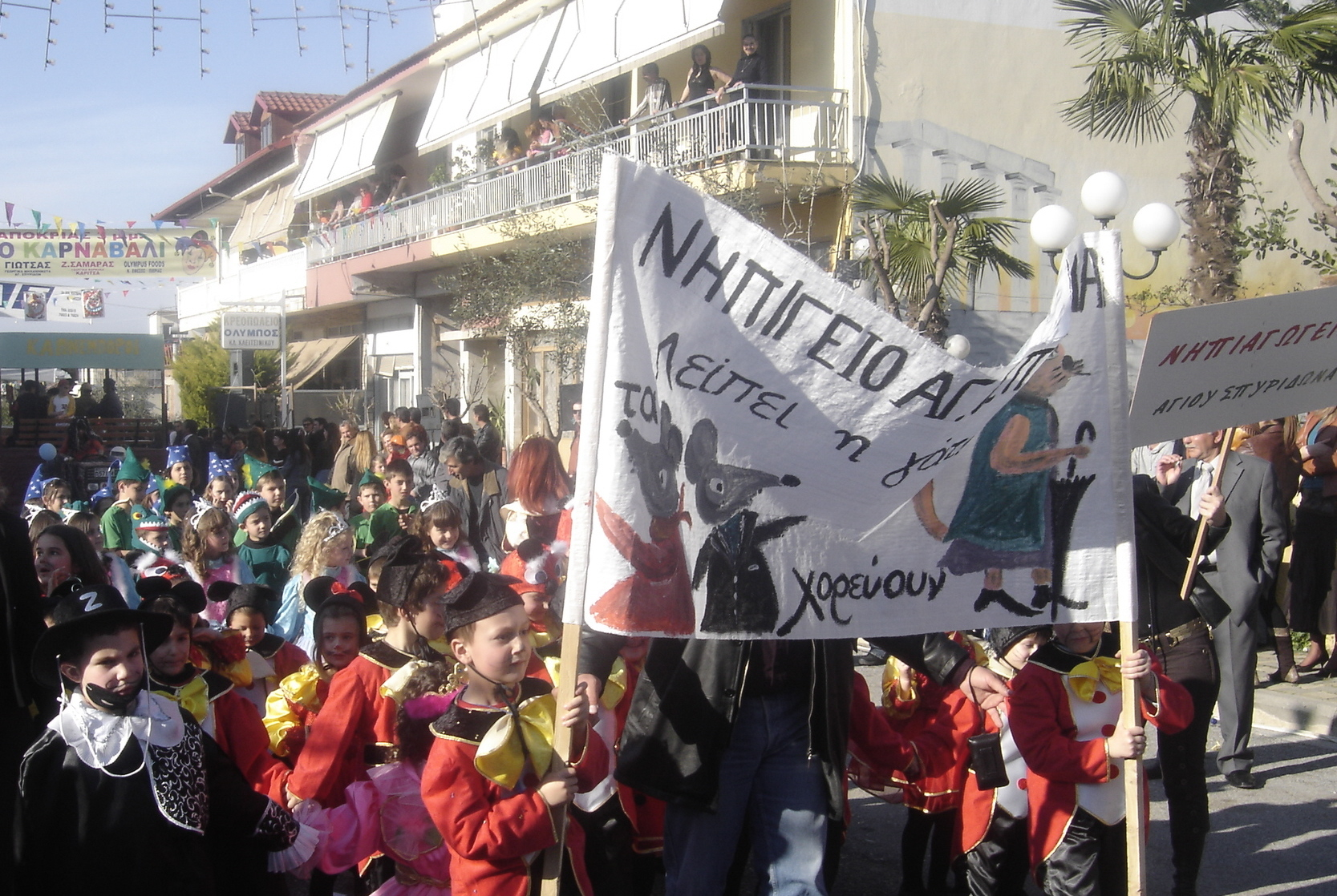 Carnival festivities in Vrontou, Pieria, 2006.